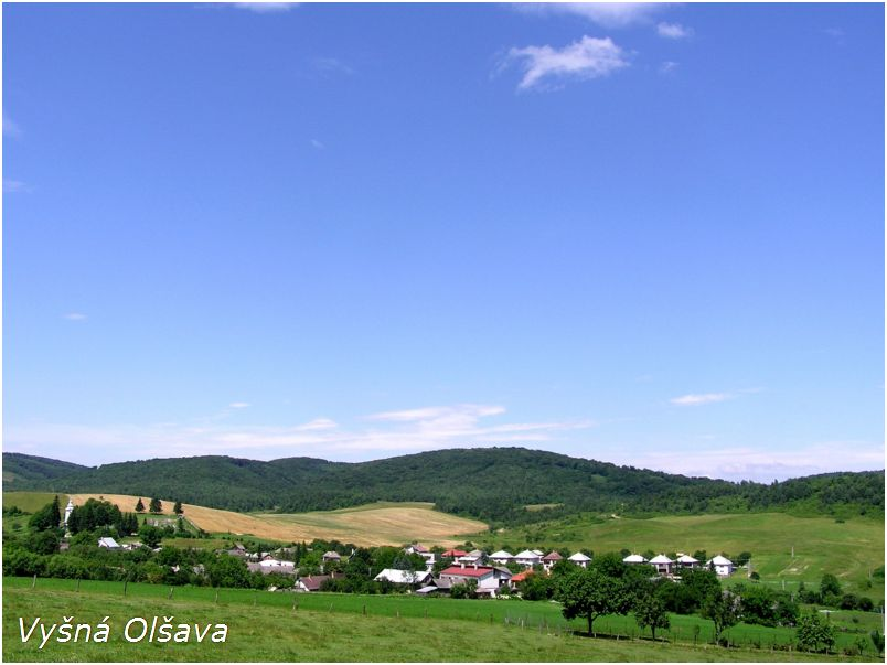 Celkový pohľad